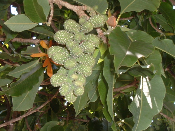 en la urbo Lavras, MG., Brazilo